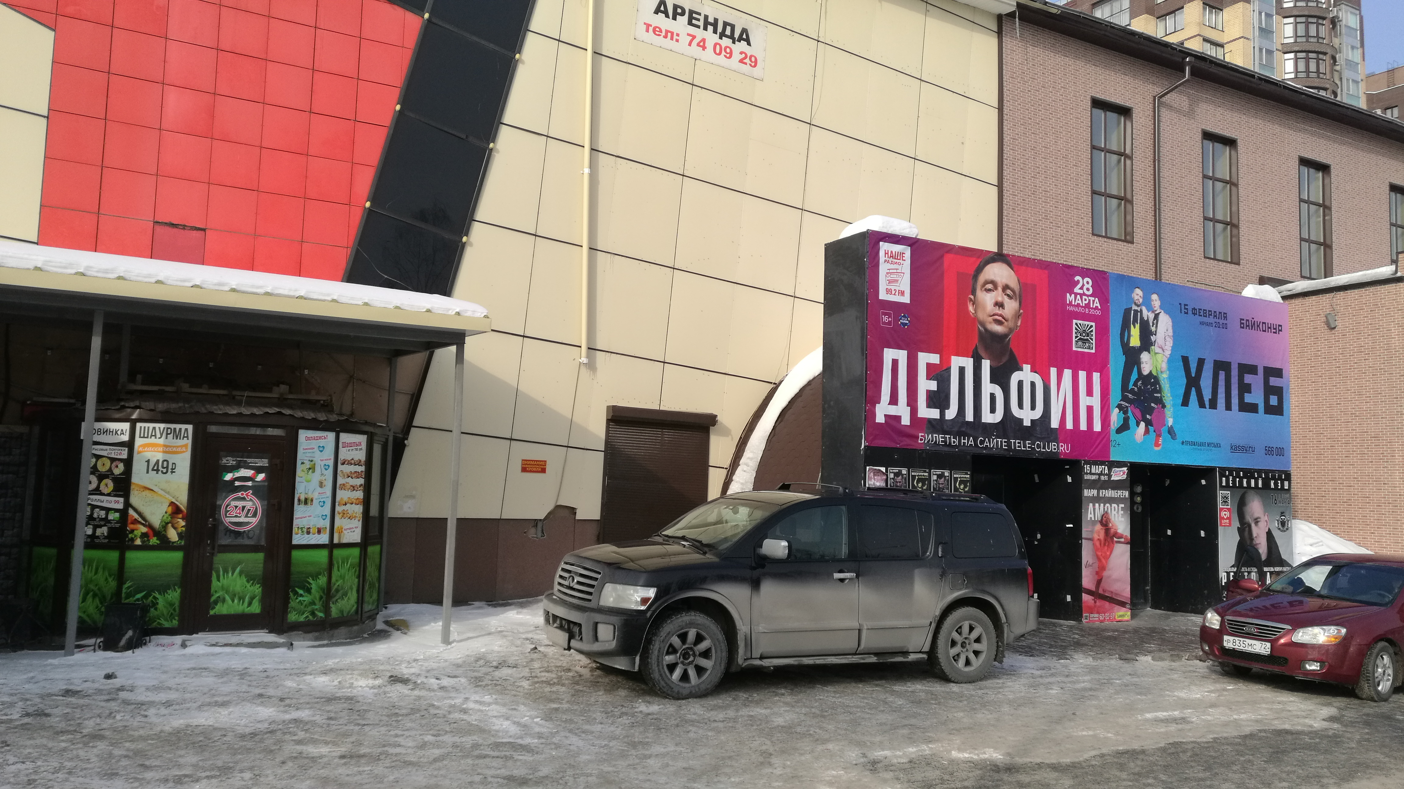 Klubo kaj kafejoj en strato Gorkij. Tjumeno, Rusio.